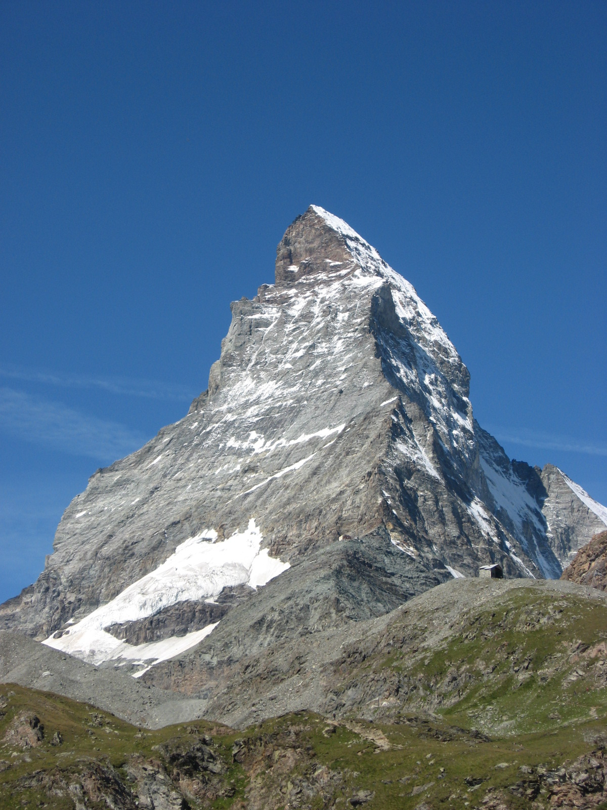 Profilo del Monte Cervino